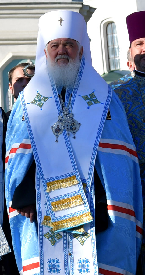 Участь Президента у заходах до Дня захисника України